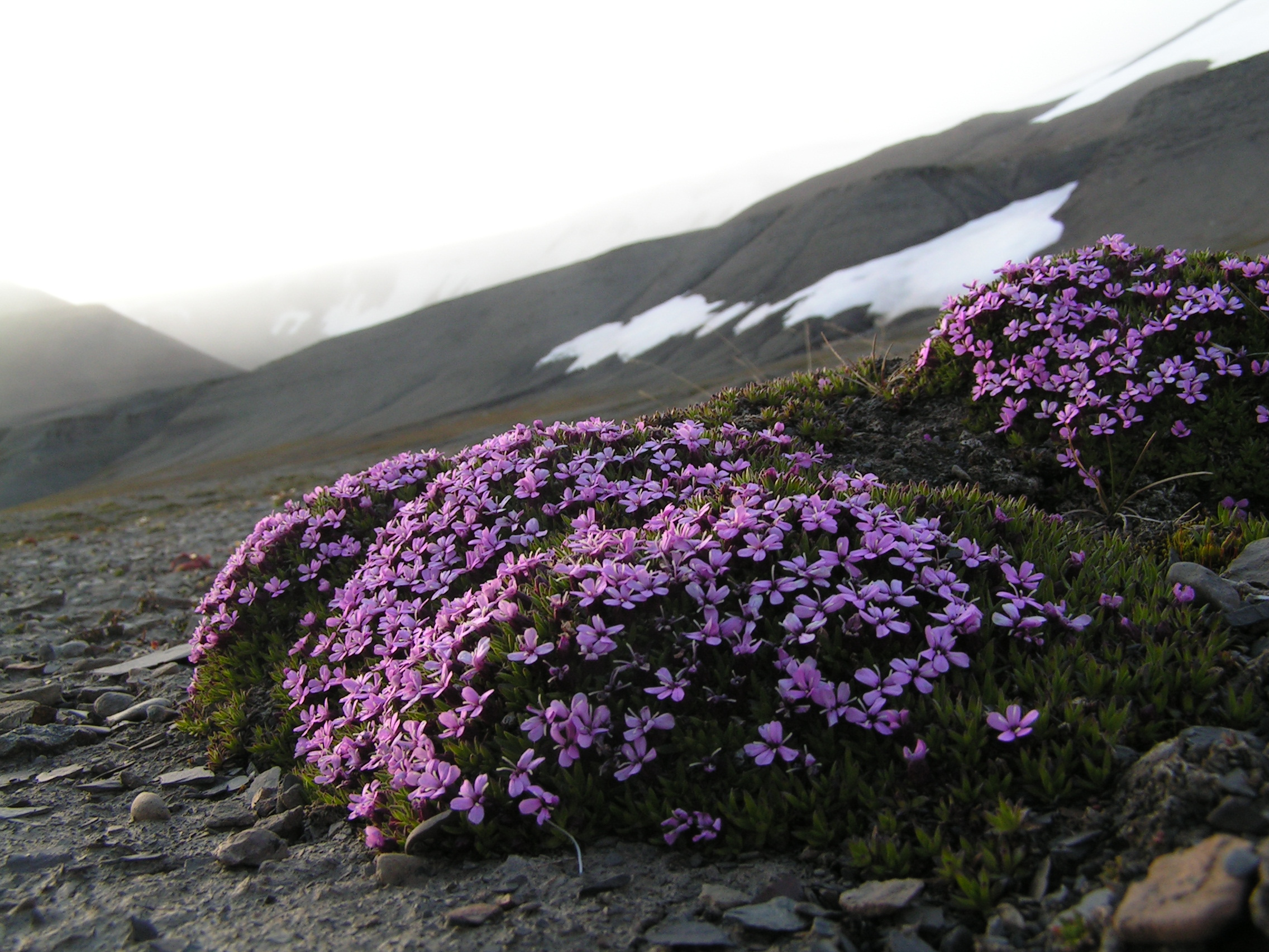 Fjellsmelle (silene acaulis) Barentsøya, Svalbard